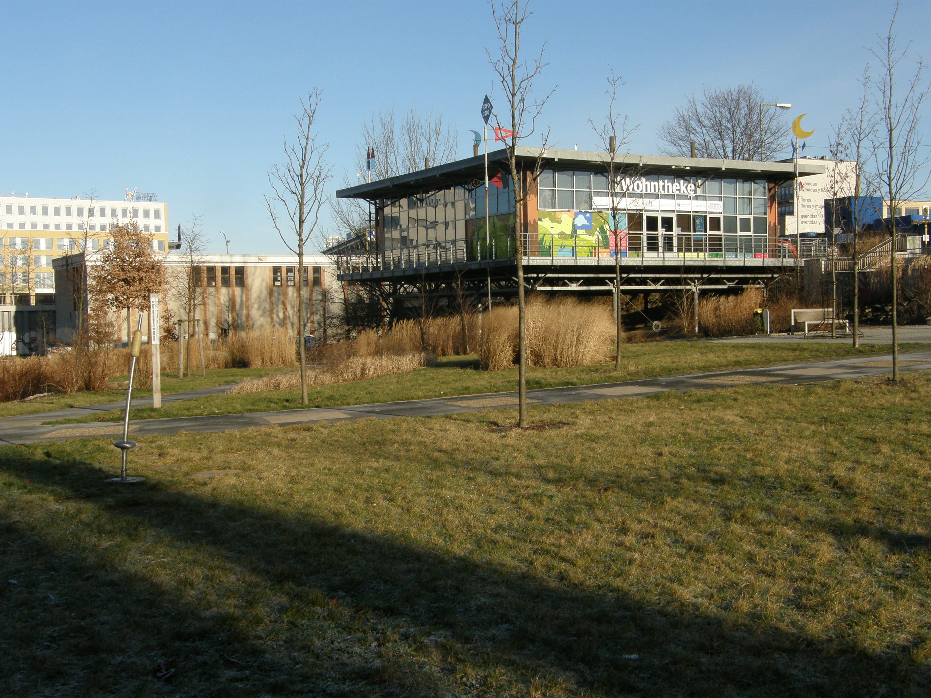 Berlin-Hellersdorf, Regine-Hildebrandt-Park; "Baukasten"